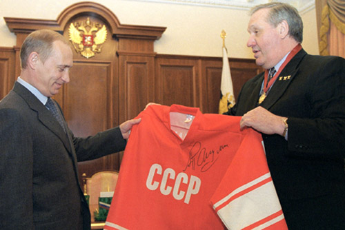 МОСКВА, КРЕМЛЬ. Вице-президент Всероссийской общественной организации «Клуб юных хоккеистов «Золотая шайба» Александр Рагулин подарил Владимиру Путину красно-белую майку, в которой он 15 лет защищал честь страны на мировых чемпионатах мира по хоккею.